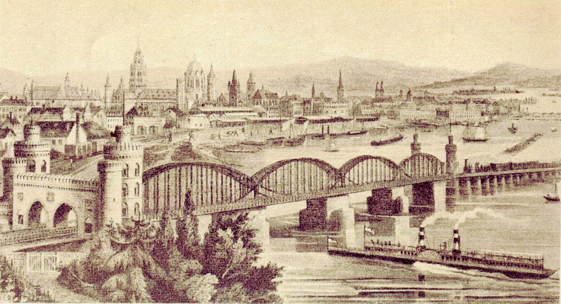 Die Eisenbahnbrücke über den Rhein, deren Bau 1860 den Anlaß zur Gründung von Werk Gustavsburg gab.